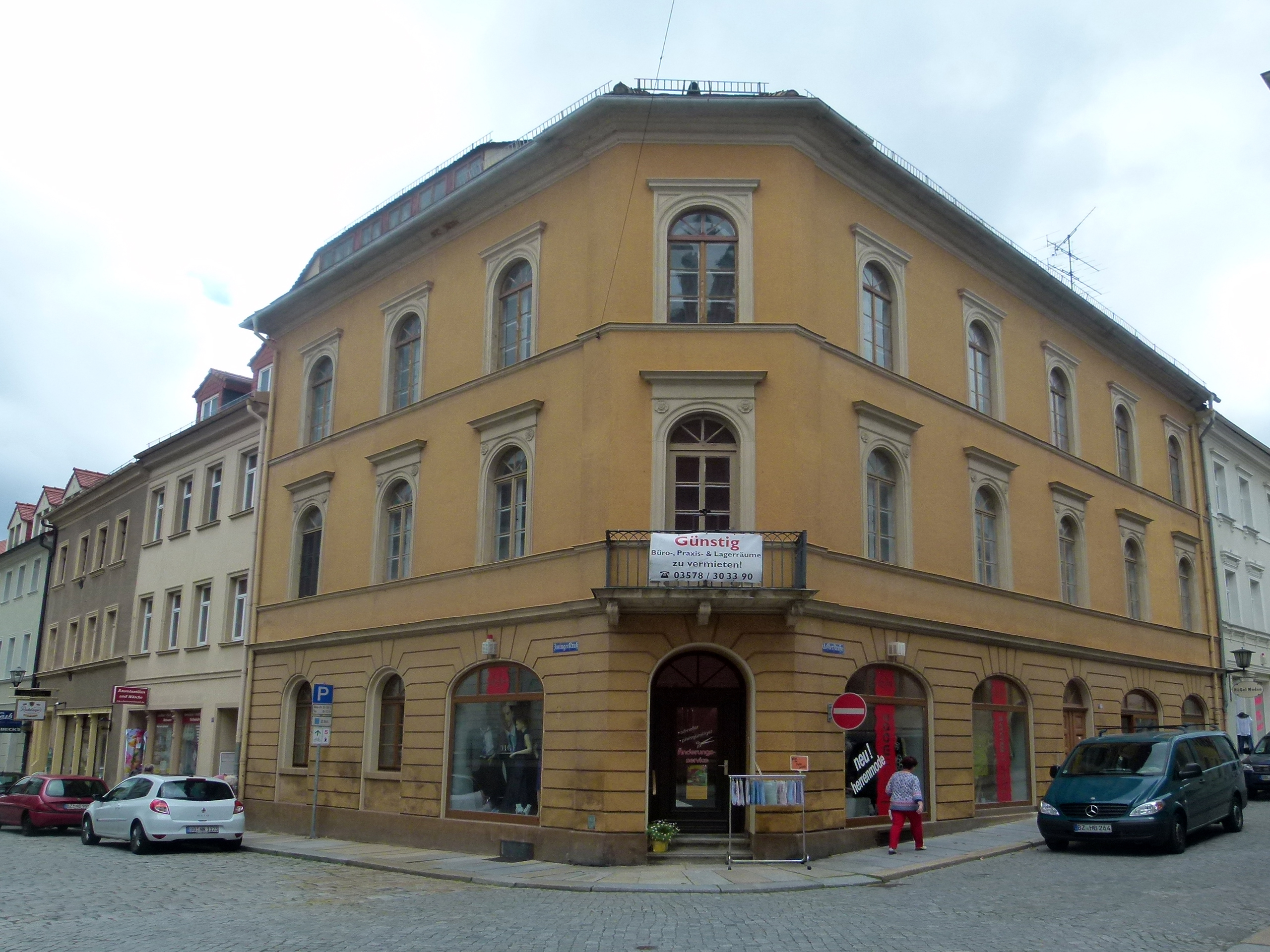 Denkmalgeschütztes Haus, Klosterstraße 1, Kamenz